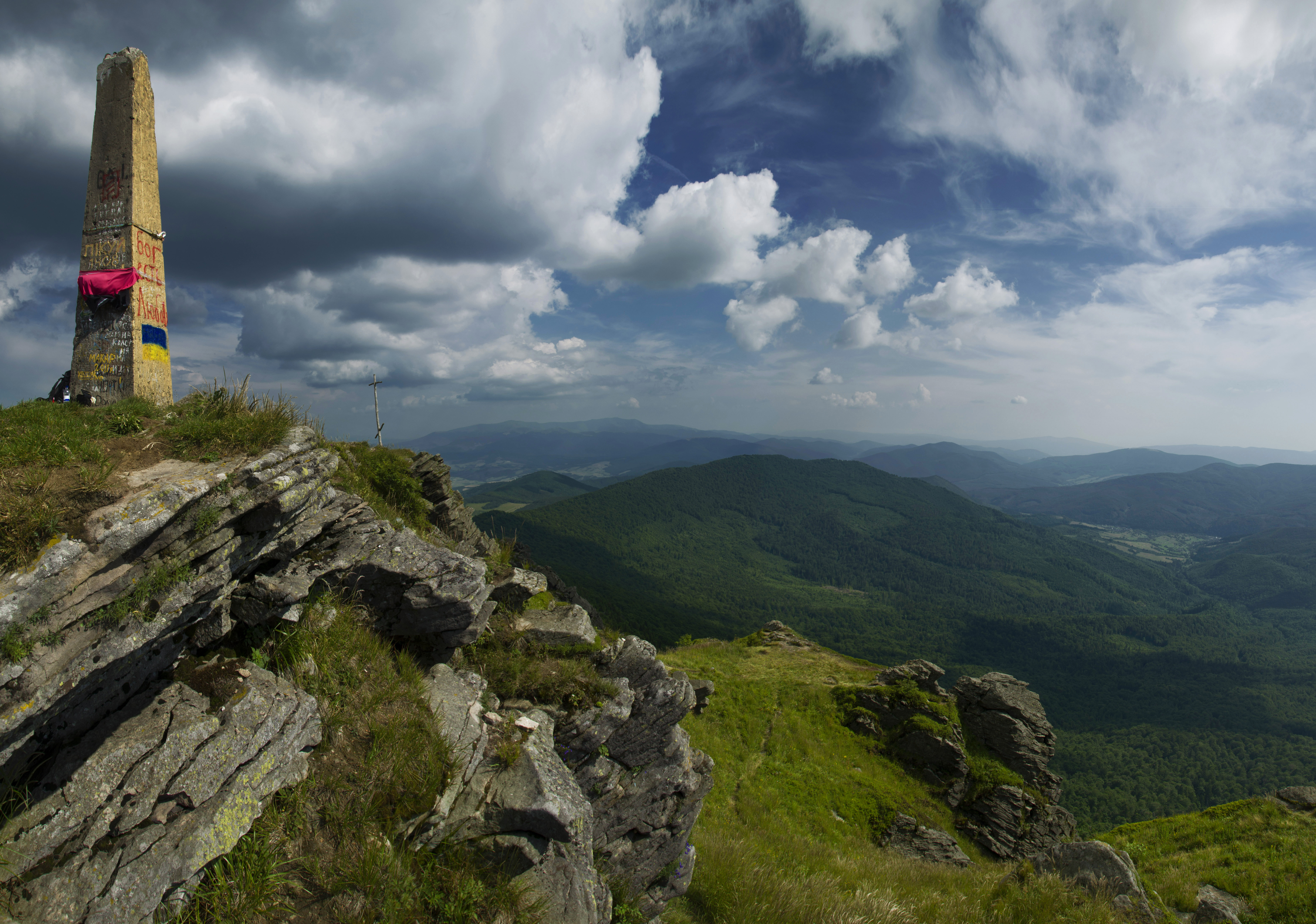 Пікуй, Турківський район, Верховинське л-во, кв. 22, 26-28 (427 га); «Боринський лісгосп» Либохорівське л-во, кв. 38-40 (284 га)